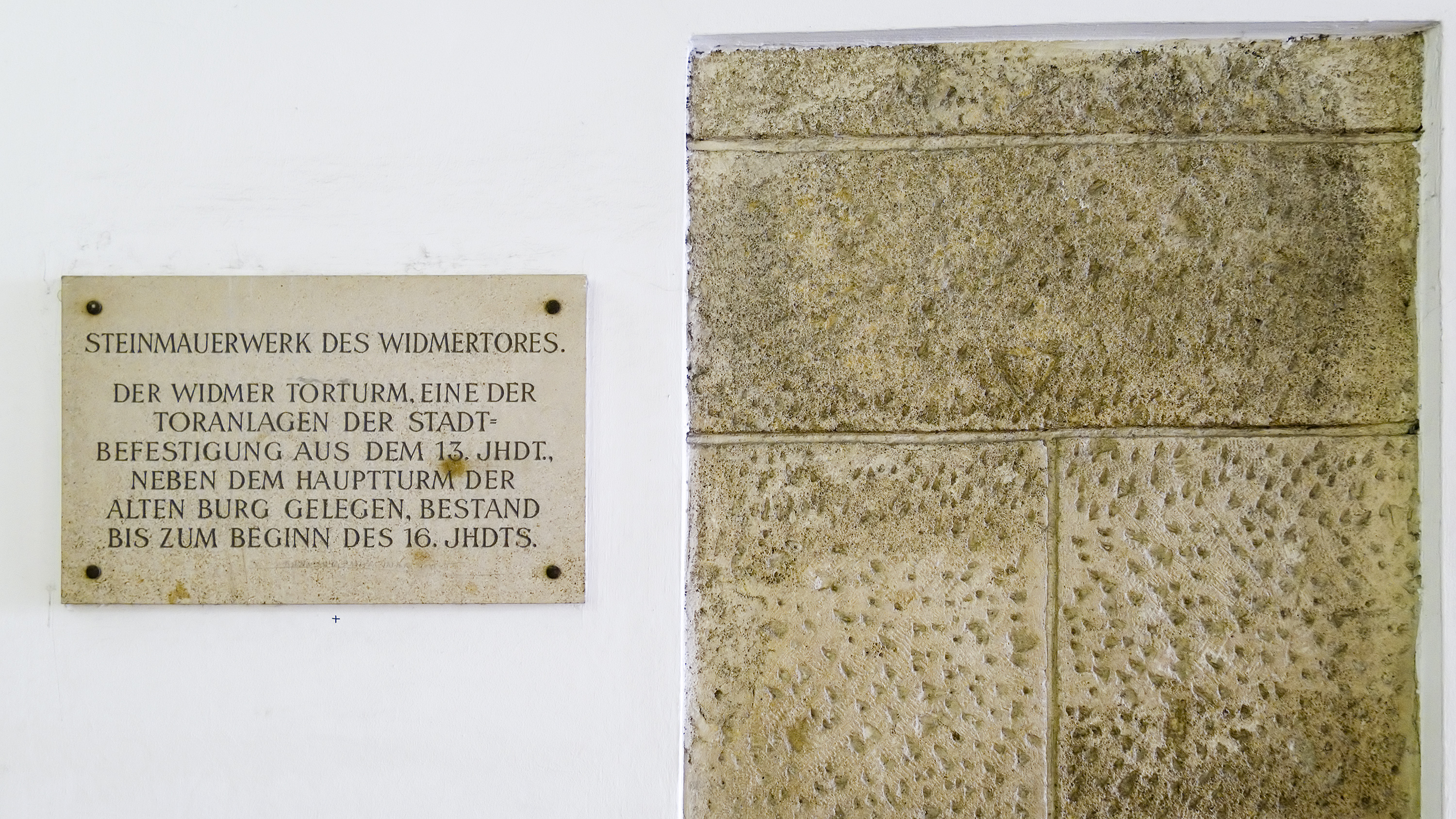 Mauerwerk des ehemaligen Widmertores in der Hofburg in Wien 1